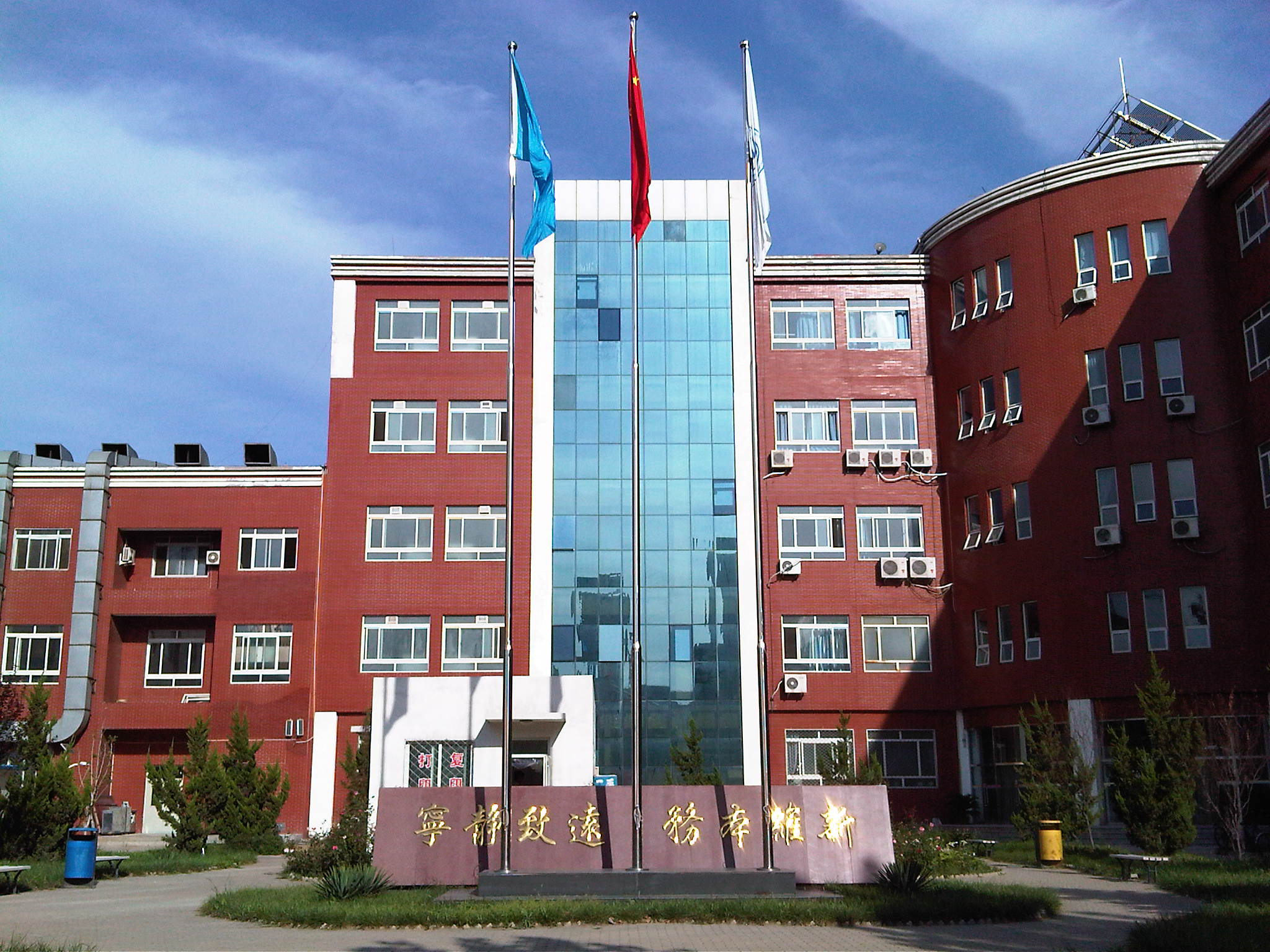 Dieses Foto ist zunächst auf panoramio von Bohao Zhao veröffentlicht.